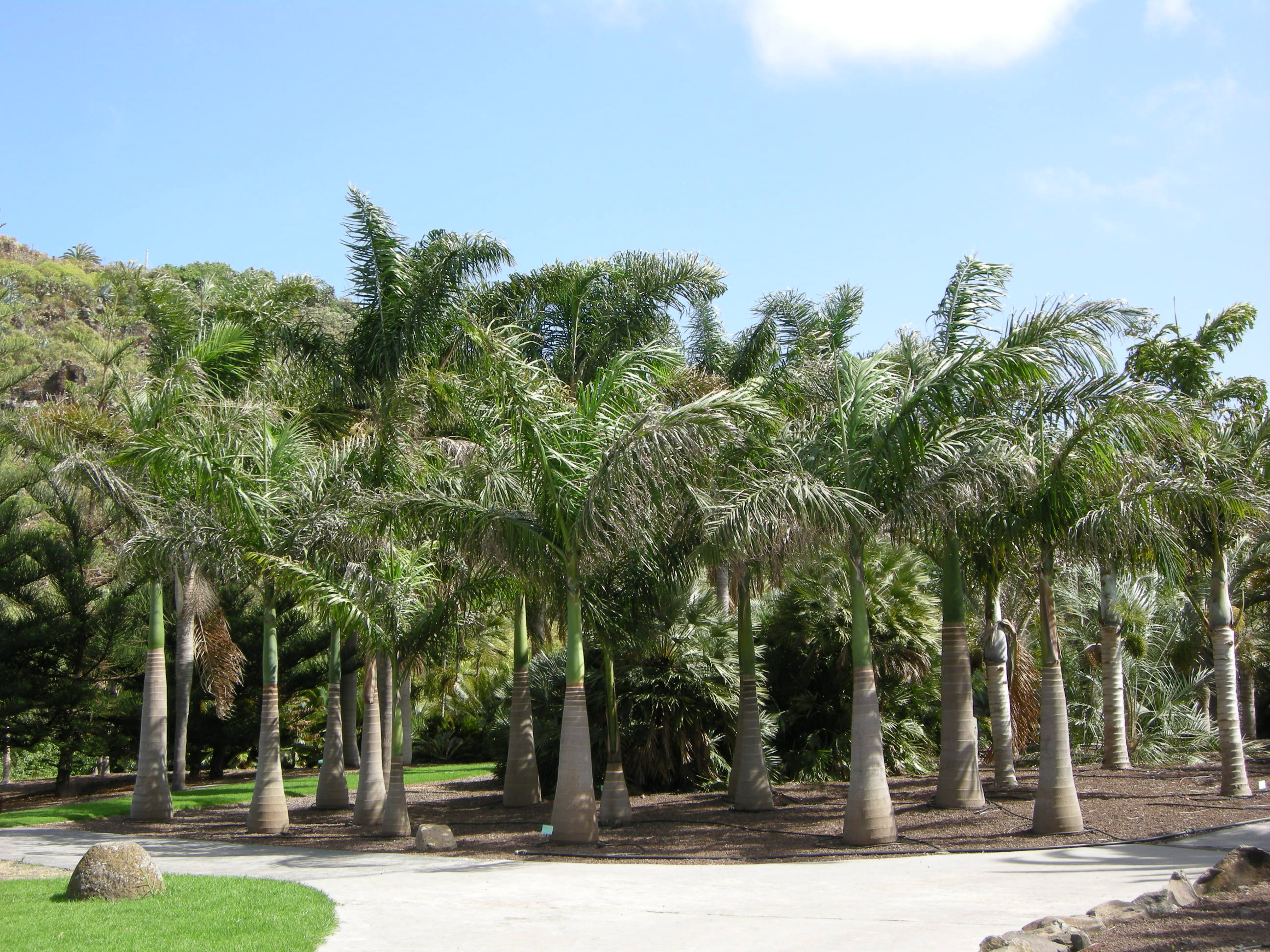 Jardín canario